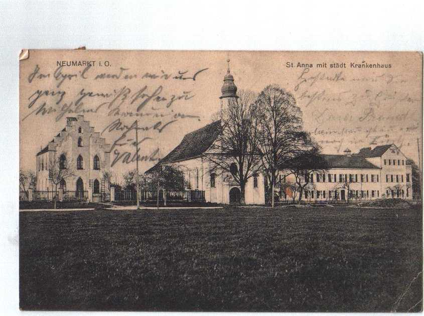 Ansichtskarte schwarzweiß-Photo "St. Annna mit städt. Krankenhaus"